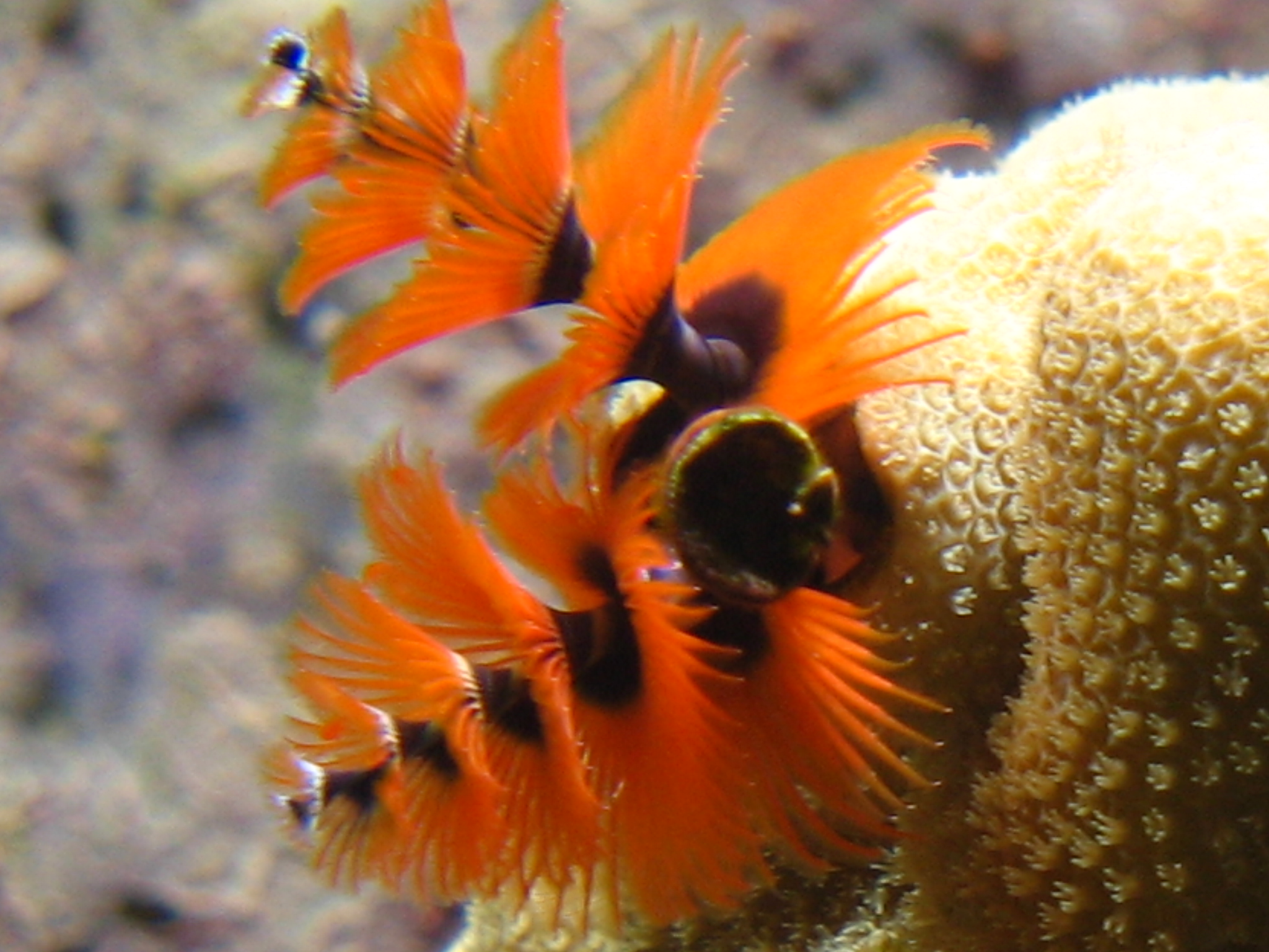 Aquazoo-Löbbecke-Museum, Düsseldorf